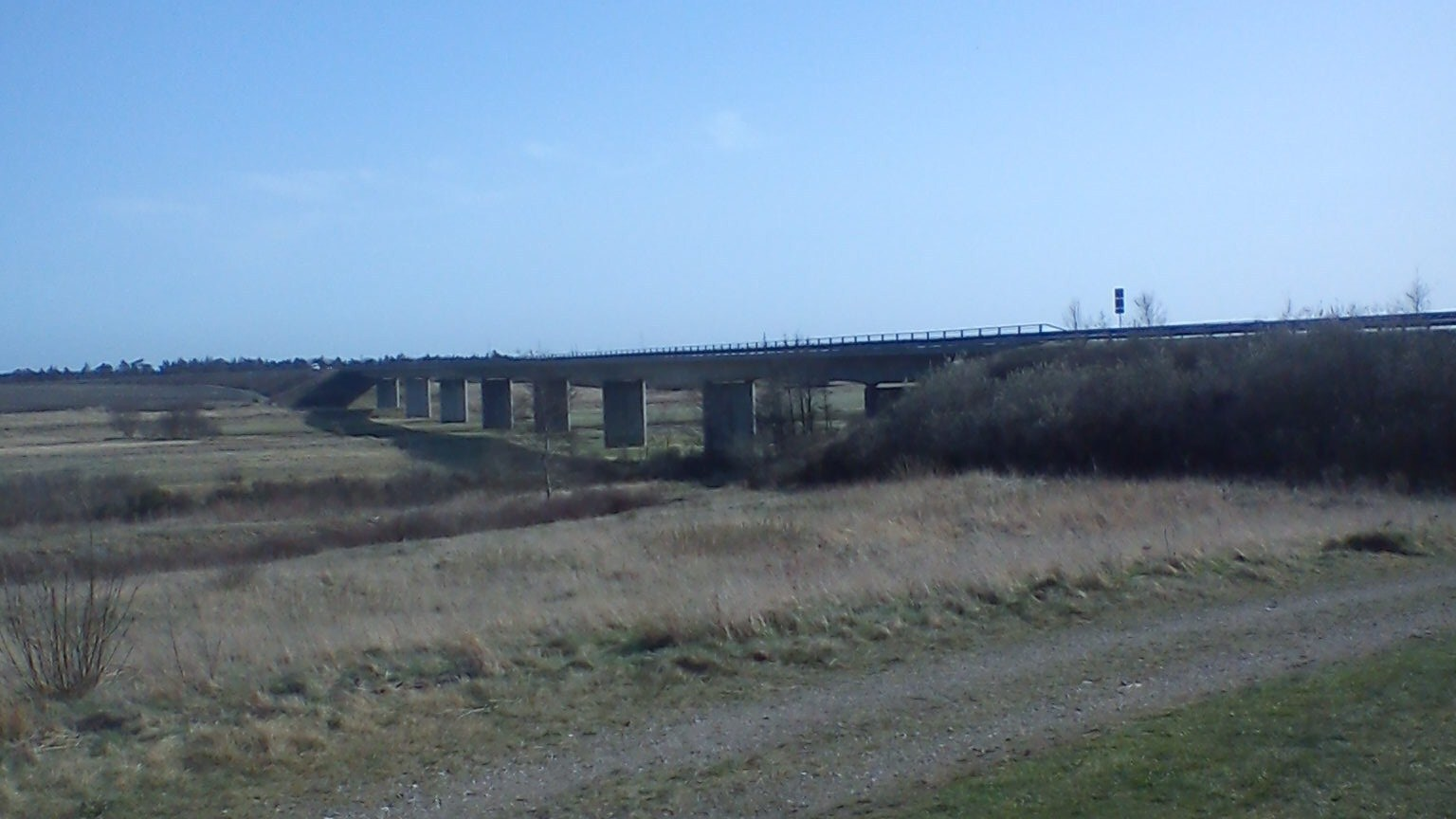 Skive Ådal Bro